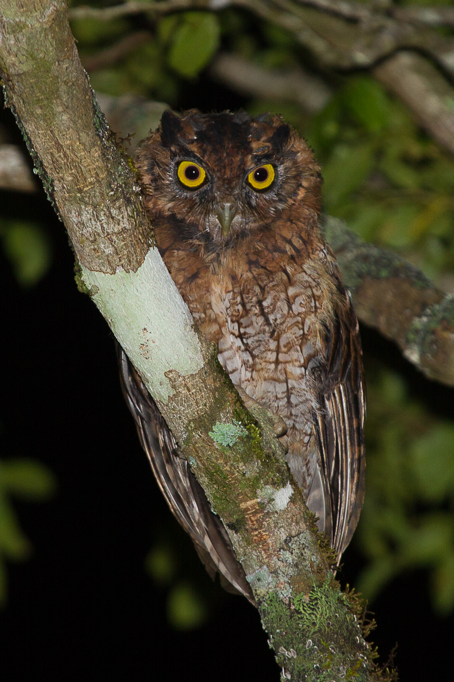 Corujinha-sapo (Megascops atricapilla) no Parque Estadual Intervales